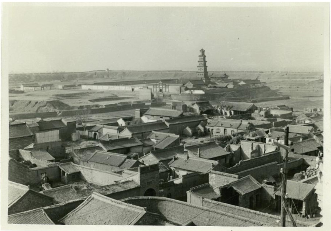 自大中楼看大云寺-山西临汾